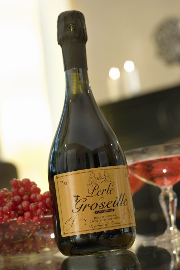 Perlé de Groseille